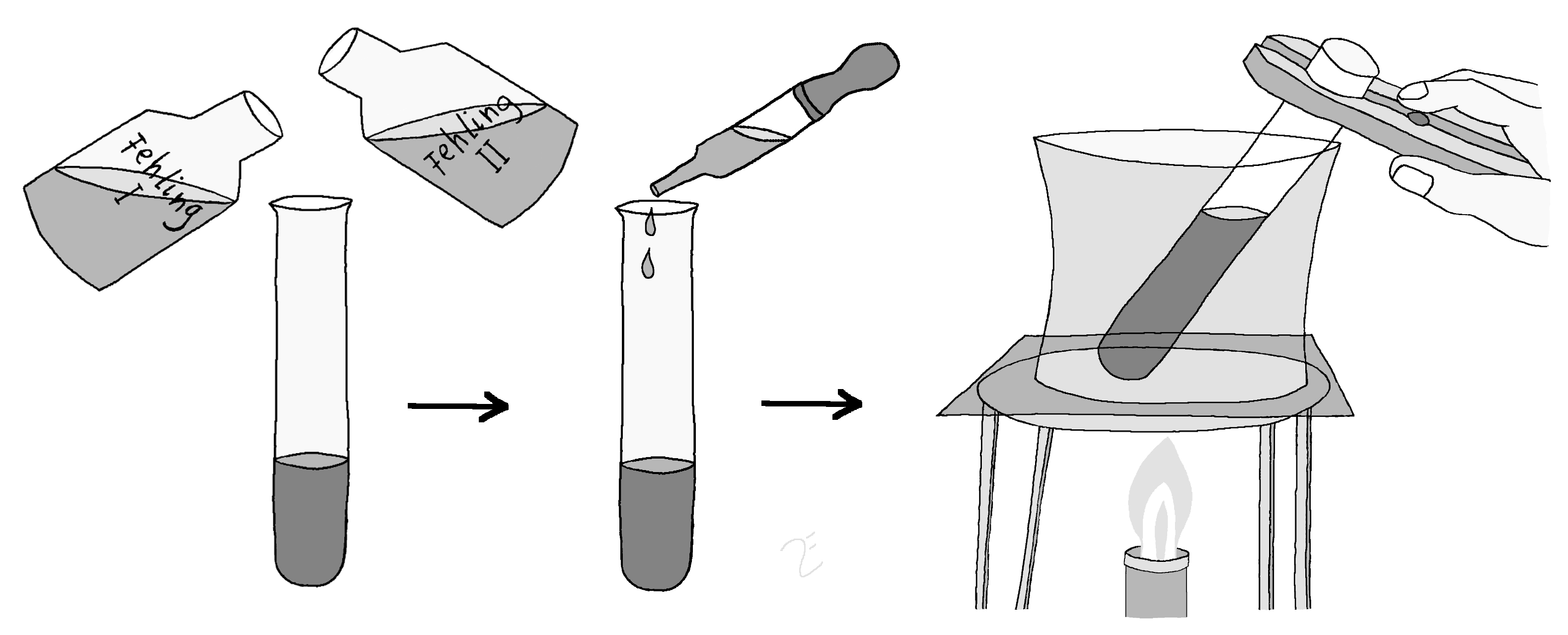 Nachweis von Glucose und Fructose mit der Fehlingprobe.